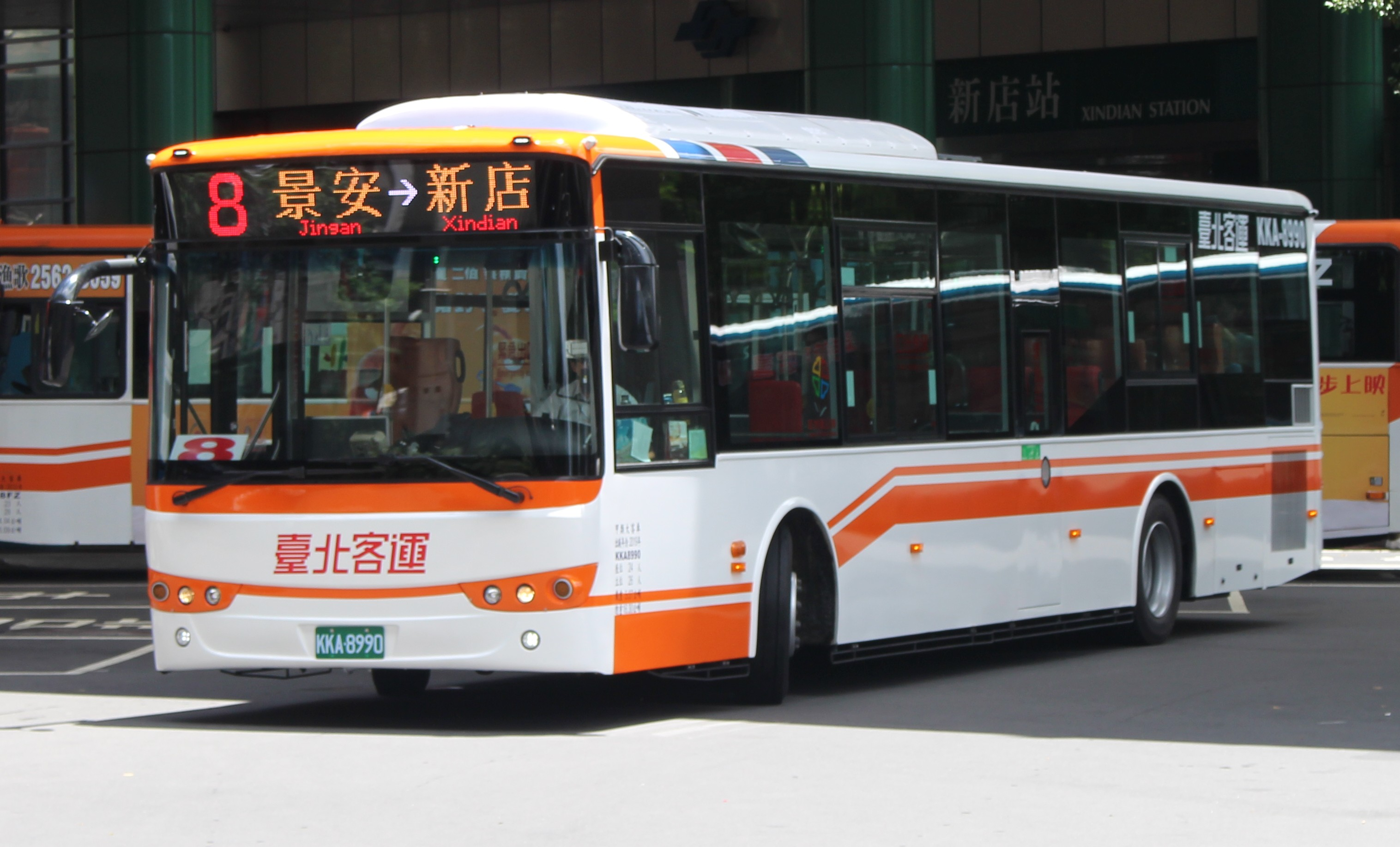 臺北客運KKA-8990 8路